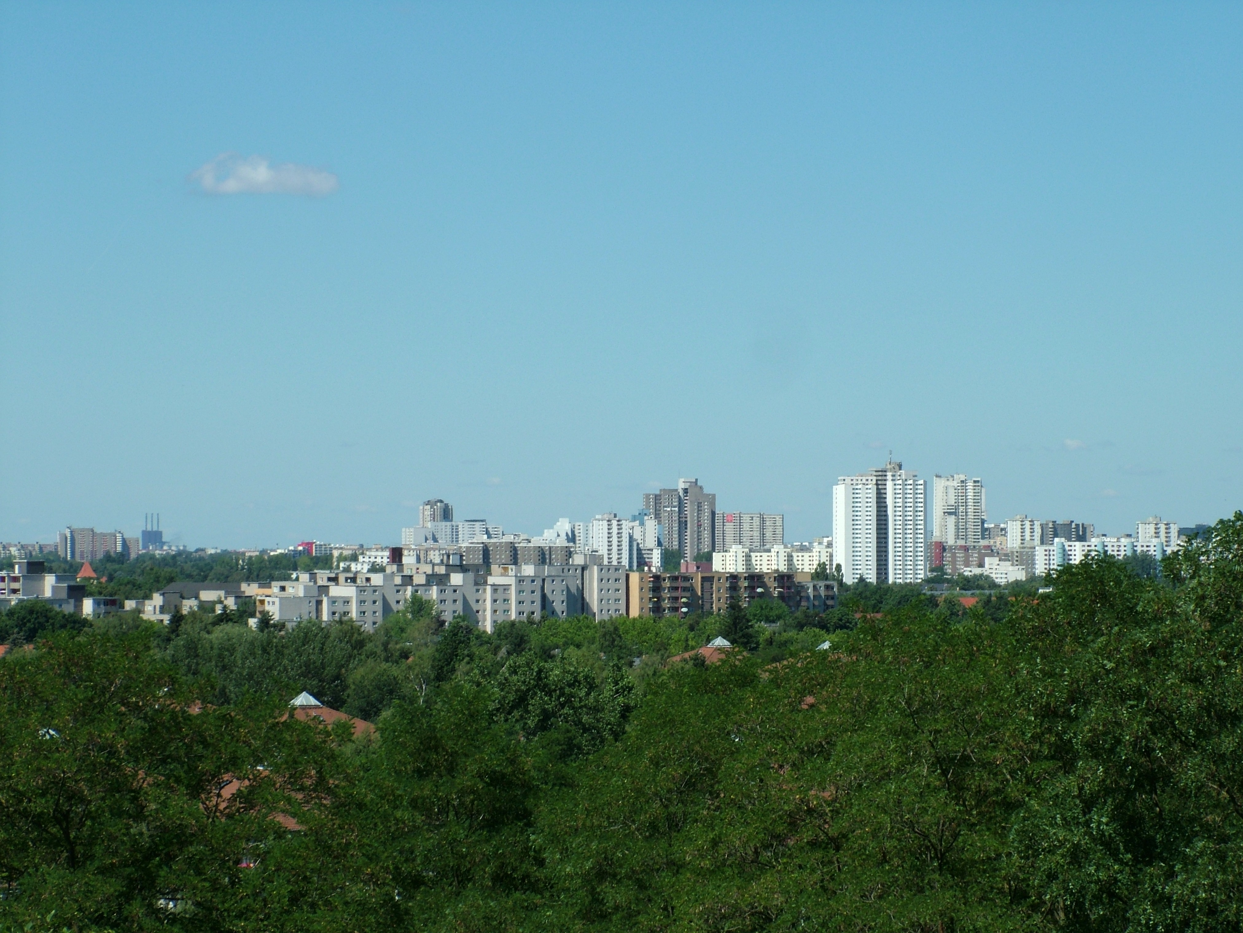 Berlin, Gropiusstadt, von der Rudower Höhe aus gesehen